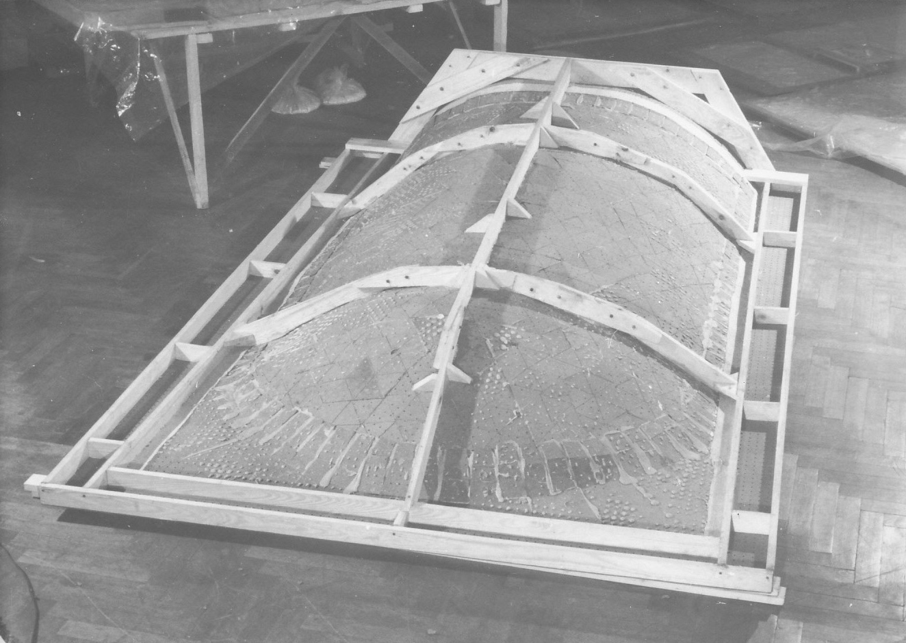 Prace konserwatorskie przy malowidłach z Faras w Muzeum Narodowym w Warszawie. Konserwacja malowideł przywiezionych z katedry w Faras - nisza z przedstawieniem Matki Boskiej z Dzieciątkiem.